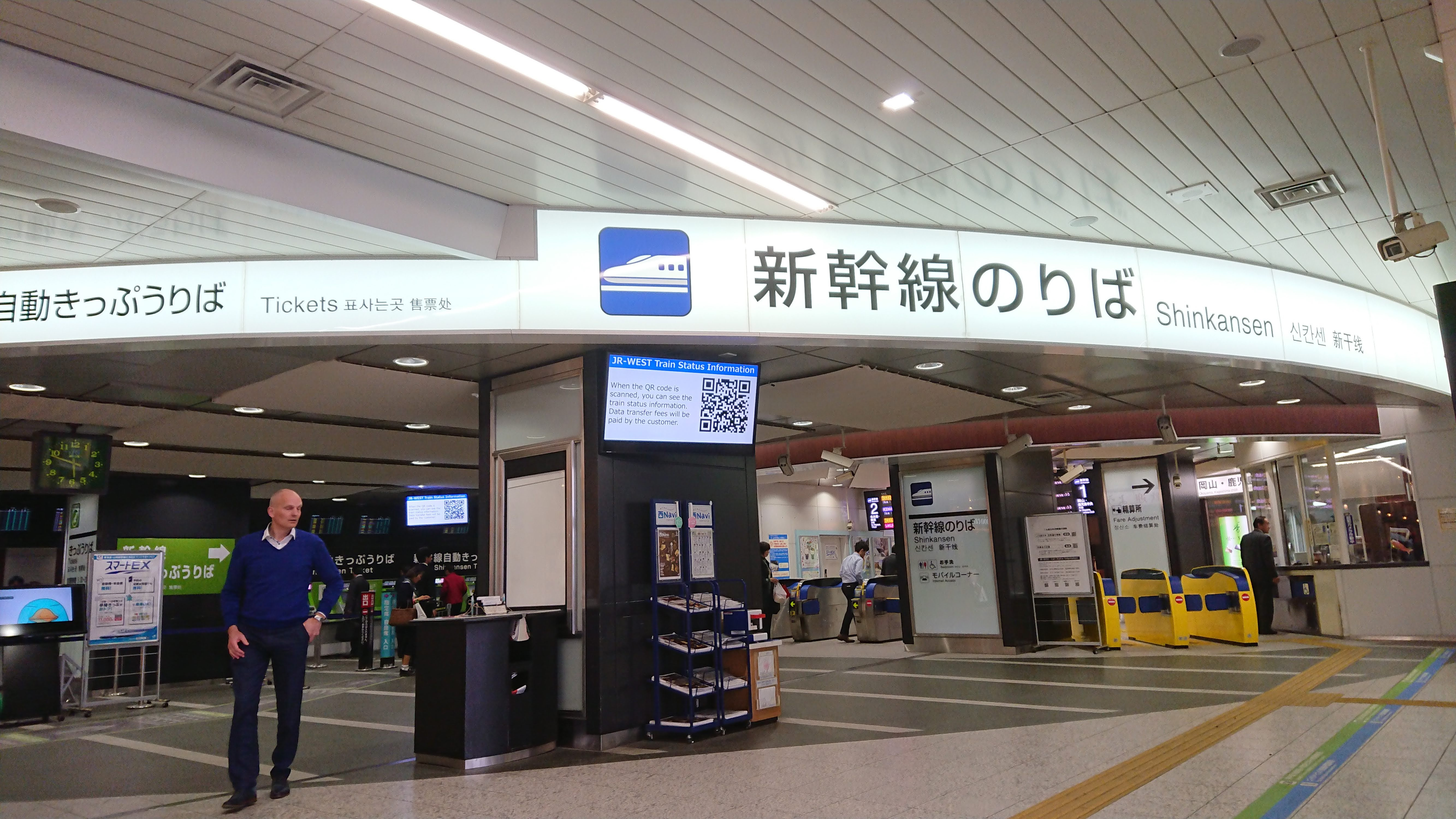 新幹線新神戸駅 改札口